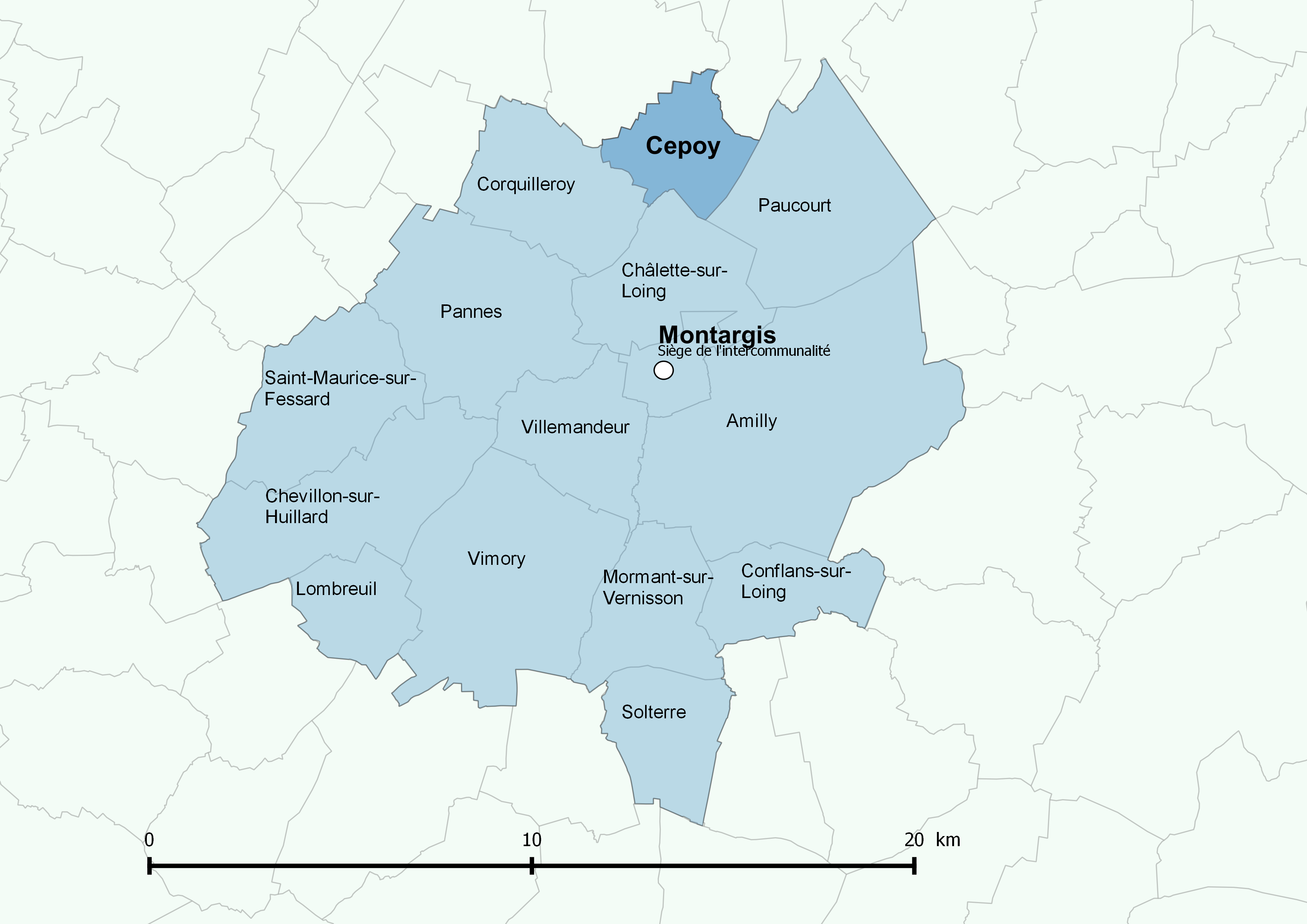 Périmètre de l'Agglomération montargoise et rives du Loing - Positionnement de la commune de Cepoy